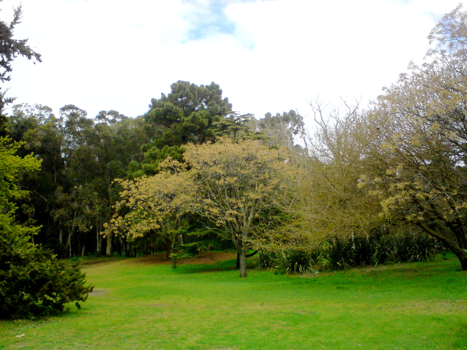 Interior del Bosque de mi ciudad Necochea, bellisimo en vegetación